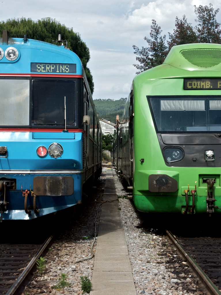 Tipo: Comboio Regional 6524 [Serpins - Coimbra Parque] * Local: Estação de Serpins [Ramal da Lousã, PK 35] Data e hora: 10 de Junho de 2008 [16h43] Material: Automotora 0458 [Unidade Dupla Diesel] em descanso: 4 automotoras Allan Renovadas (0368 + 0361 + 0360 + 0366) [Unidades Simples Diesel]